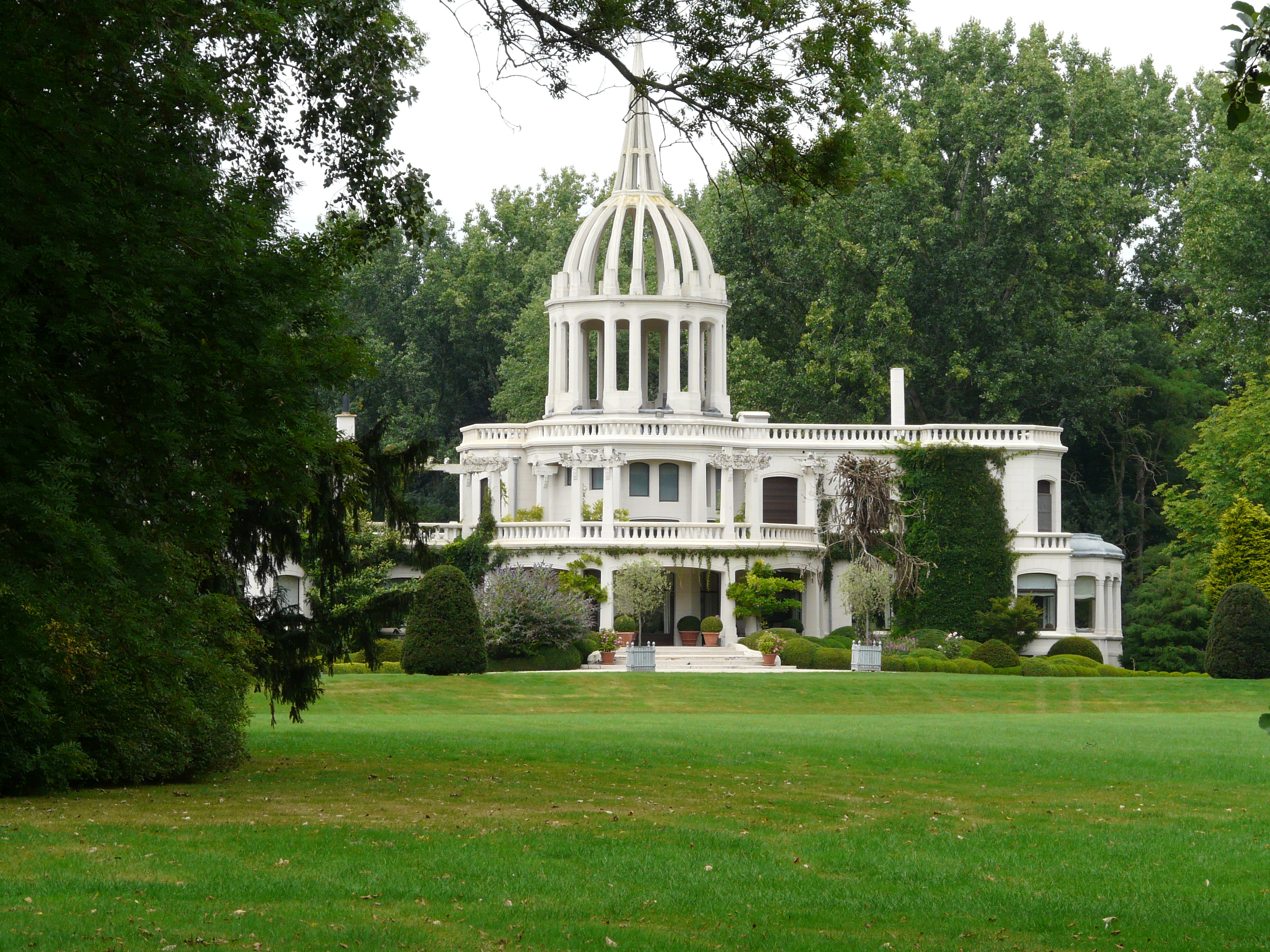 Het Elzenwallekasteel is een kasteel gelegen langs de Kemmelseweg in Voormezele, een deelgemeente van Ieper.